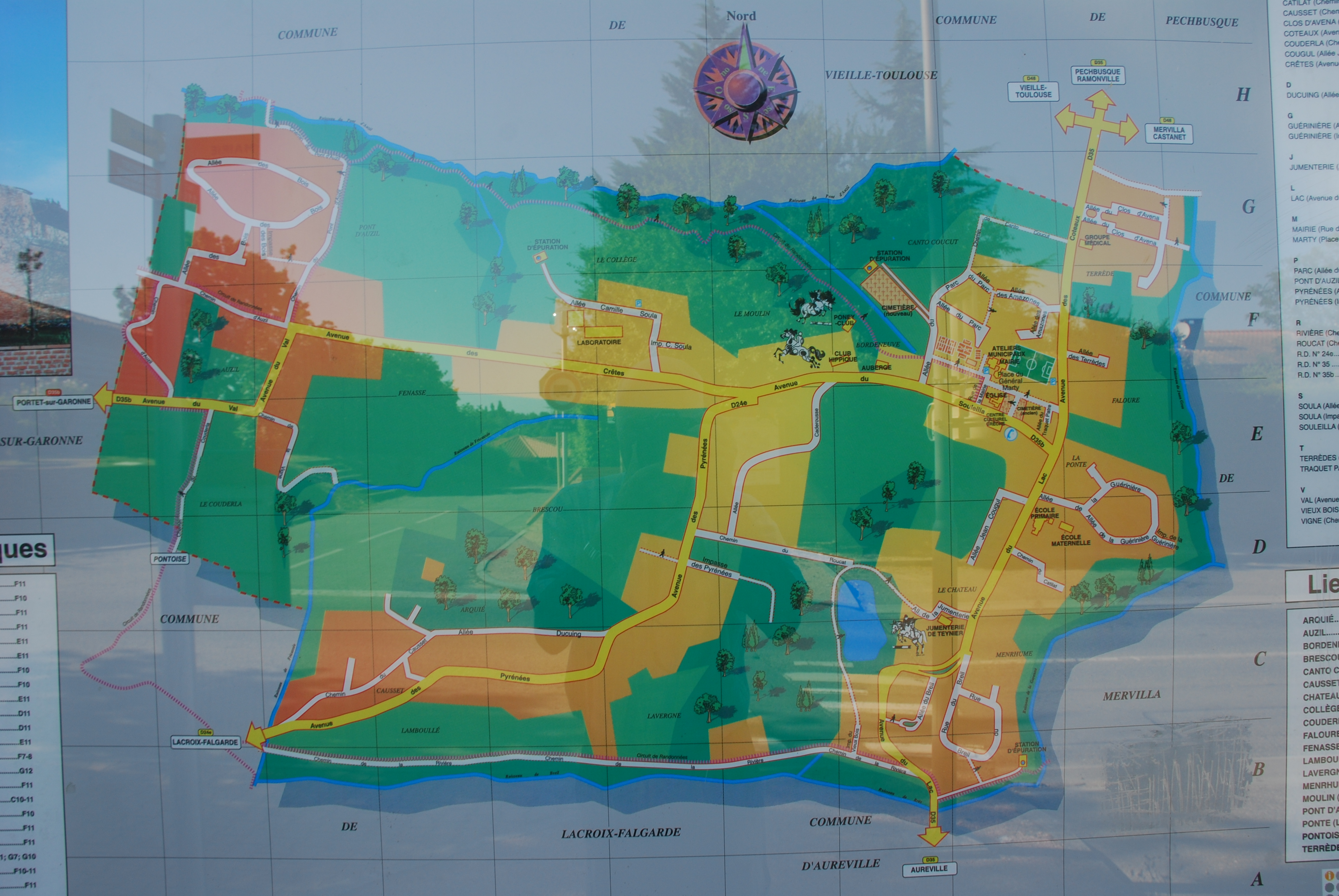 Plansous verre de Vigoulet-Auzil visible sur l'avenue du Souleilha, après le centre culturel